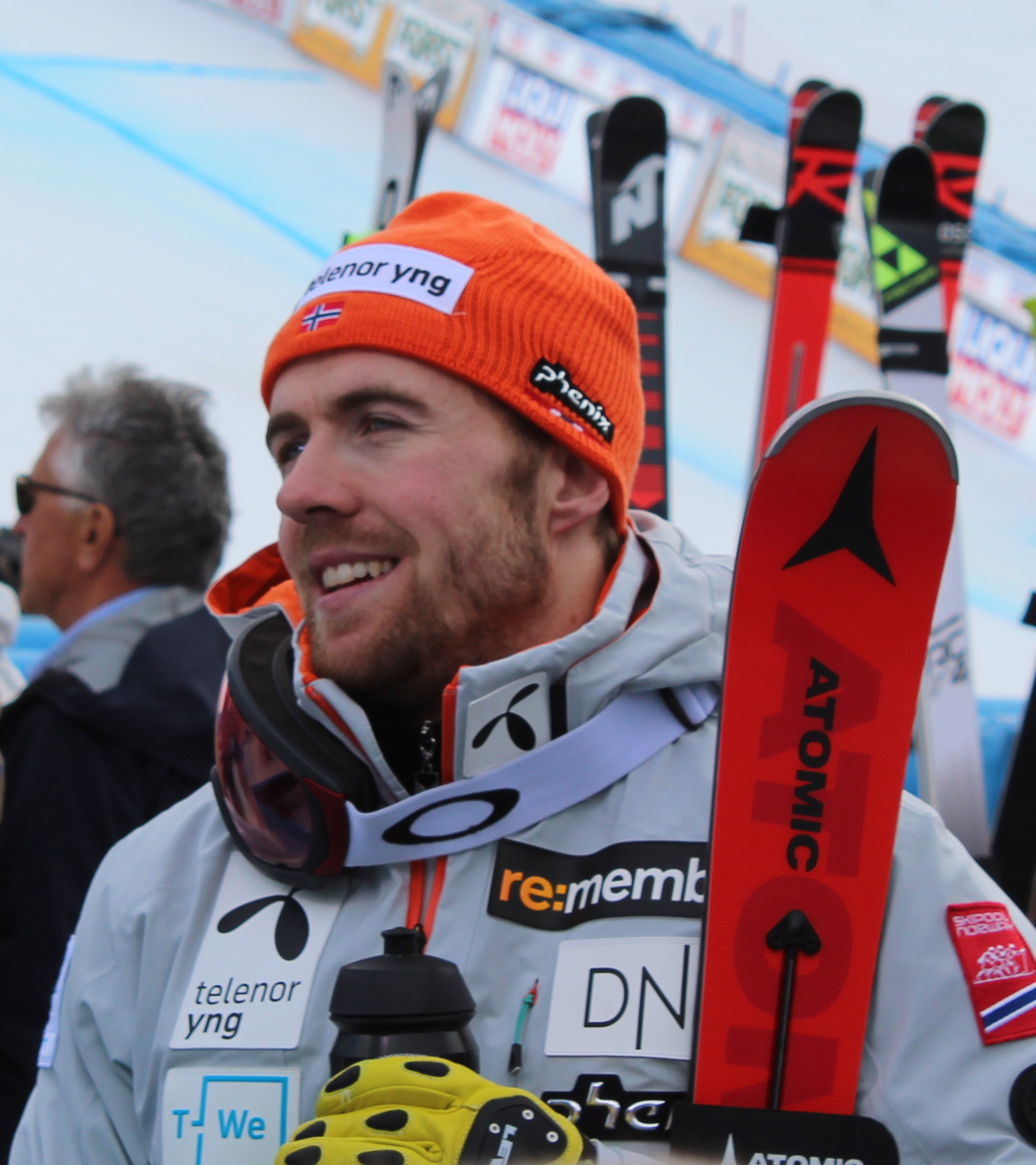 Lo siatore alpino Aleksander Aamodt Kilde viene intervistato ai piedi della Pista Stelvio di Bormio, durante la discesa libera del 27 dicembre 2019, valida per la Coppa del Mondo di sci 2019-2020.